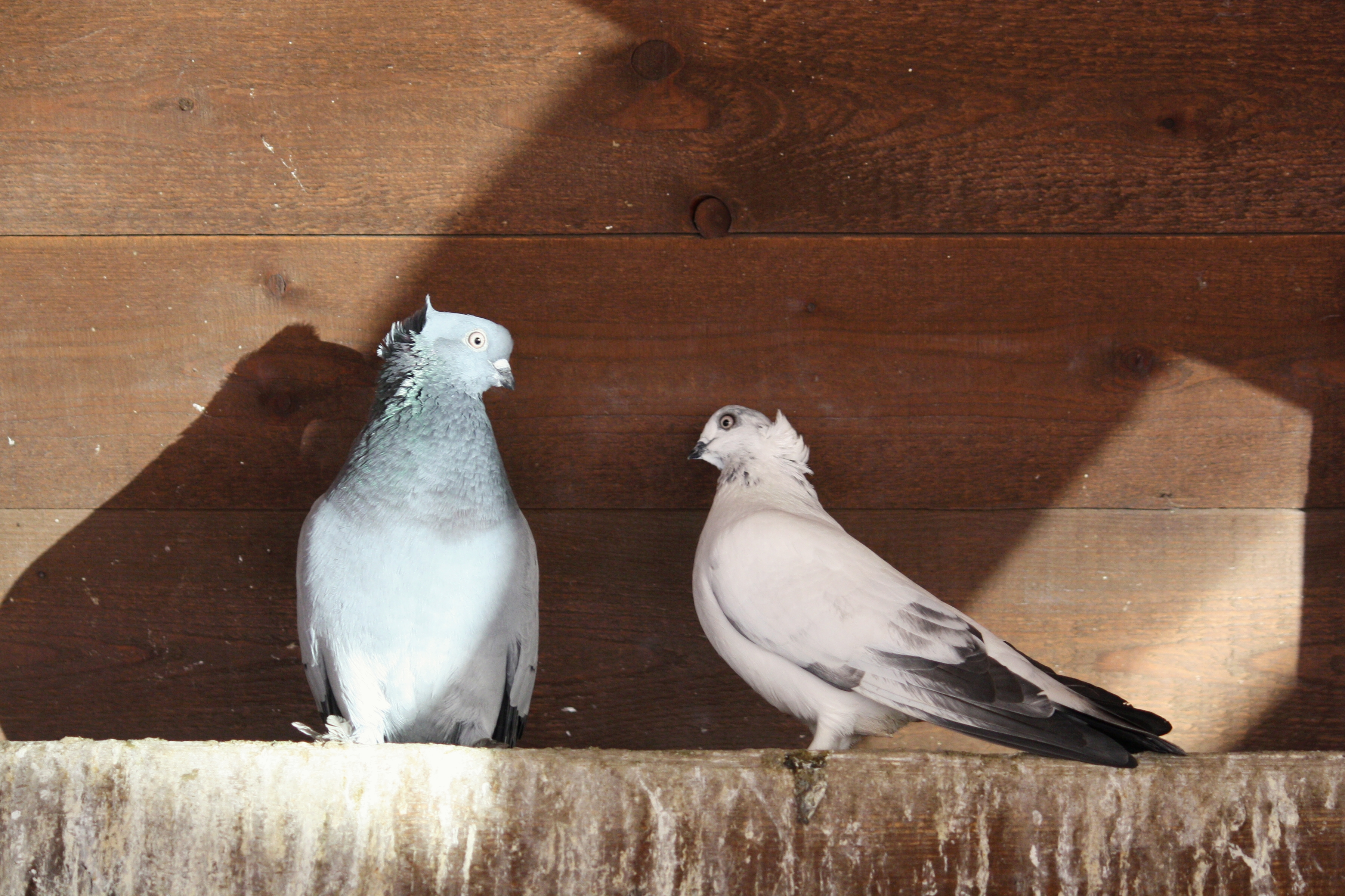 Zoo Praha český rejdič modrý pruhový a bělouš